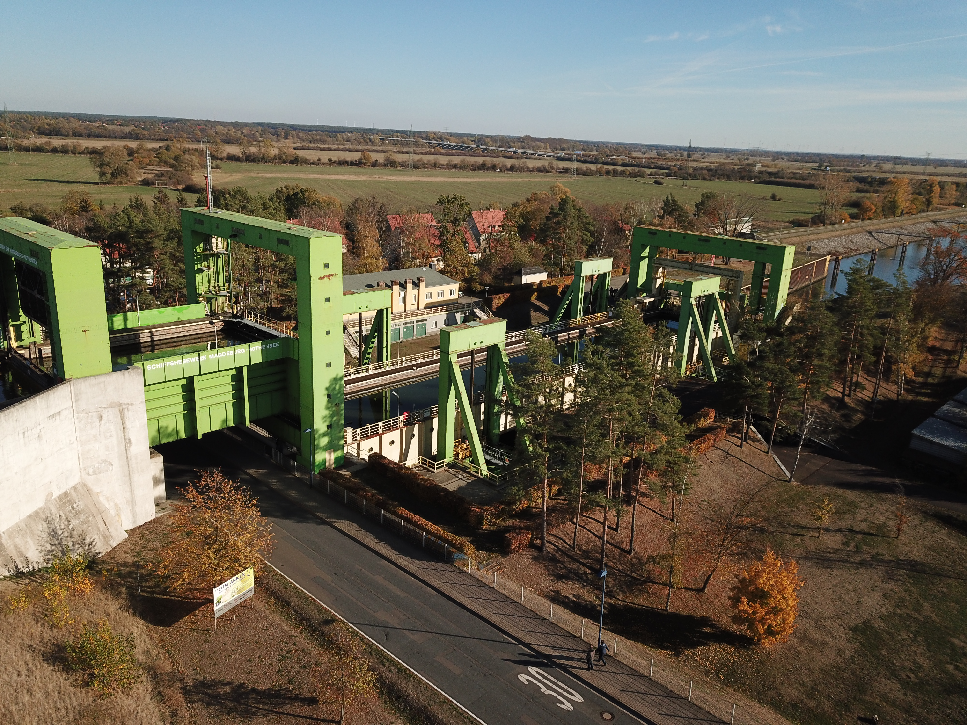 Schiffshebewerk Rothensee am Tag der offenen Tür 31.10.2018 - seitlich